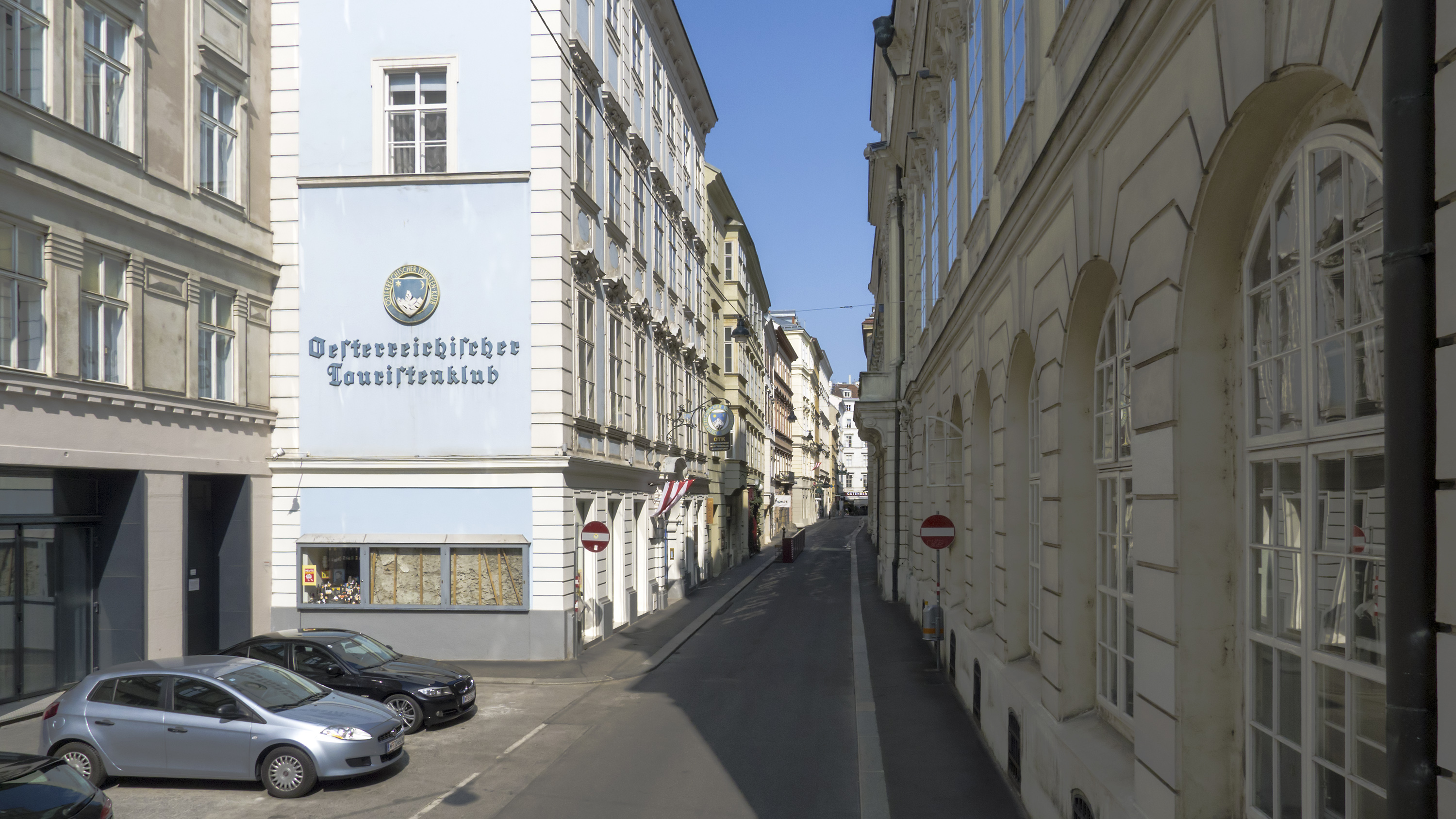 Bäckerstraße in Wien 1 bei Nr. 14 Richtung Nordwesten